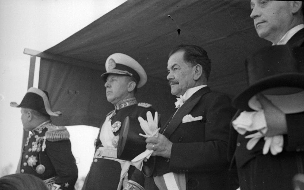 Presidente Pedro Aguirre Cerda y otras autoridades, presenciando la parada militar.